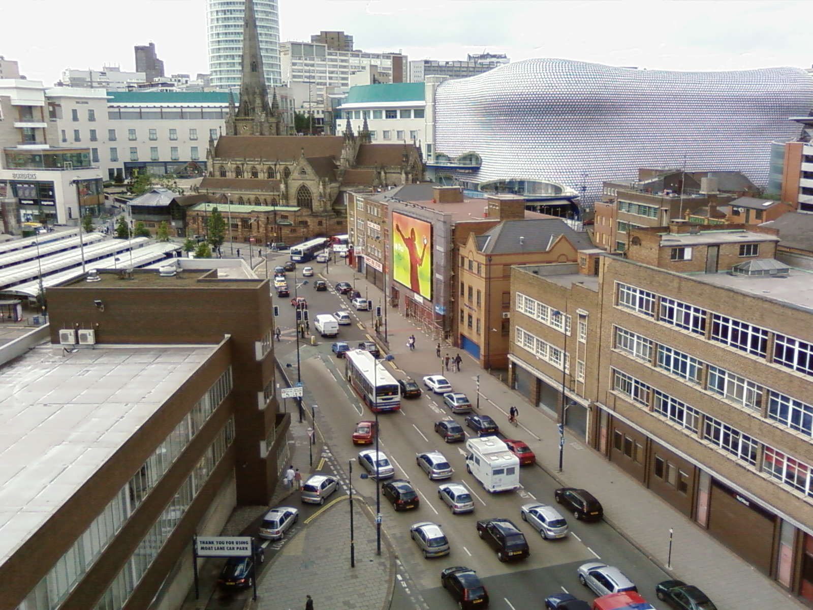 Birminghami városközpont, Egyesült Királyság